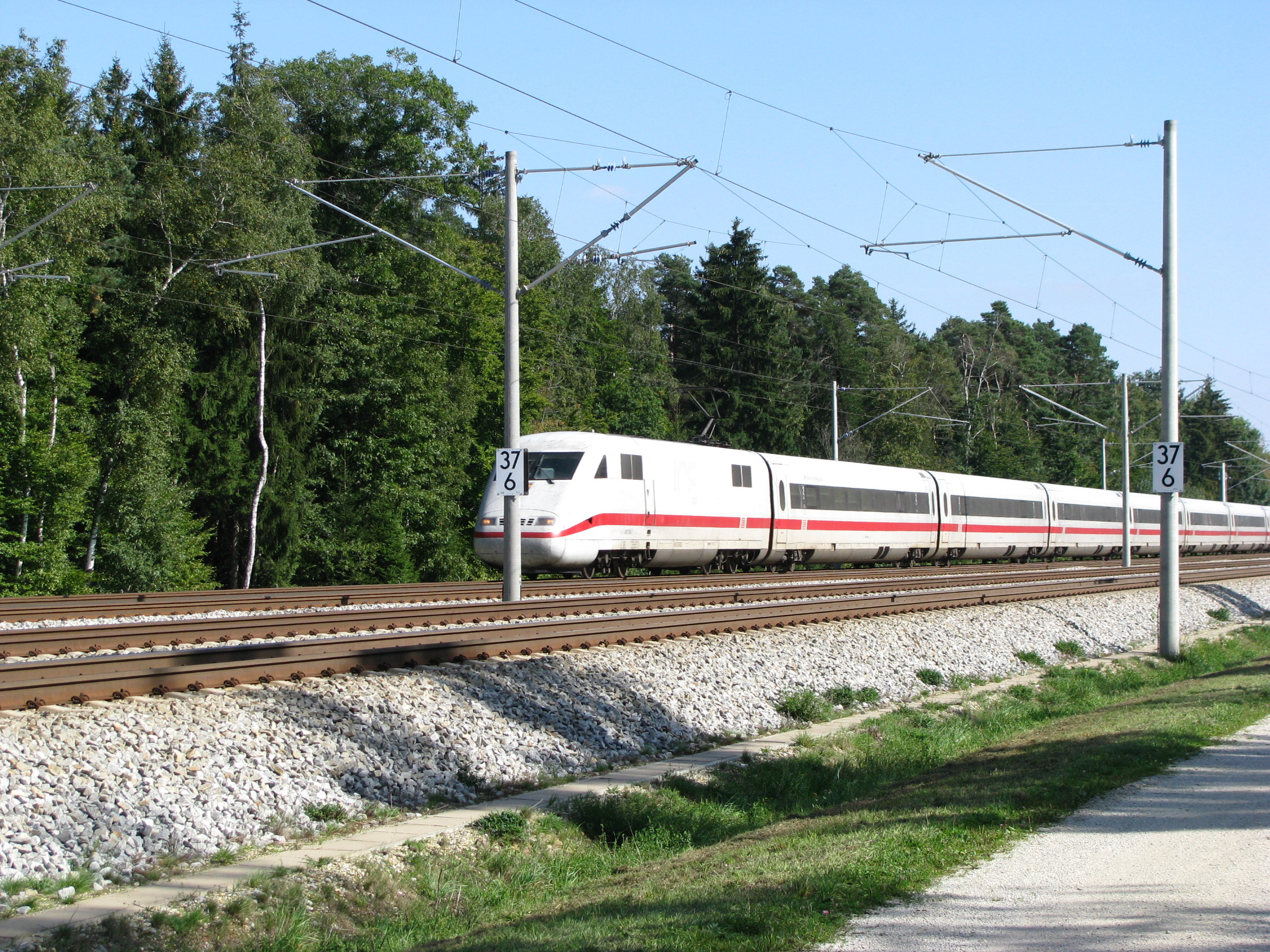 Bahnstrecke durch das Haspelmoor